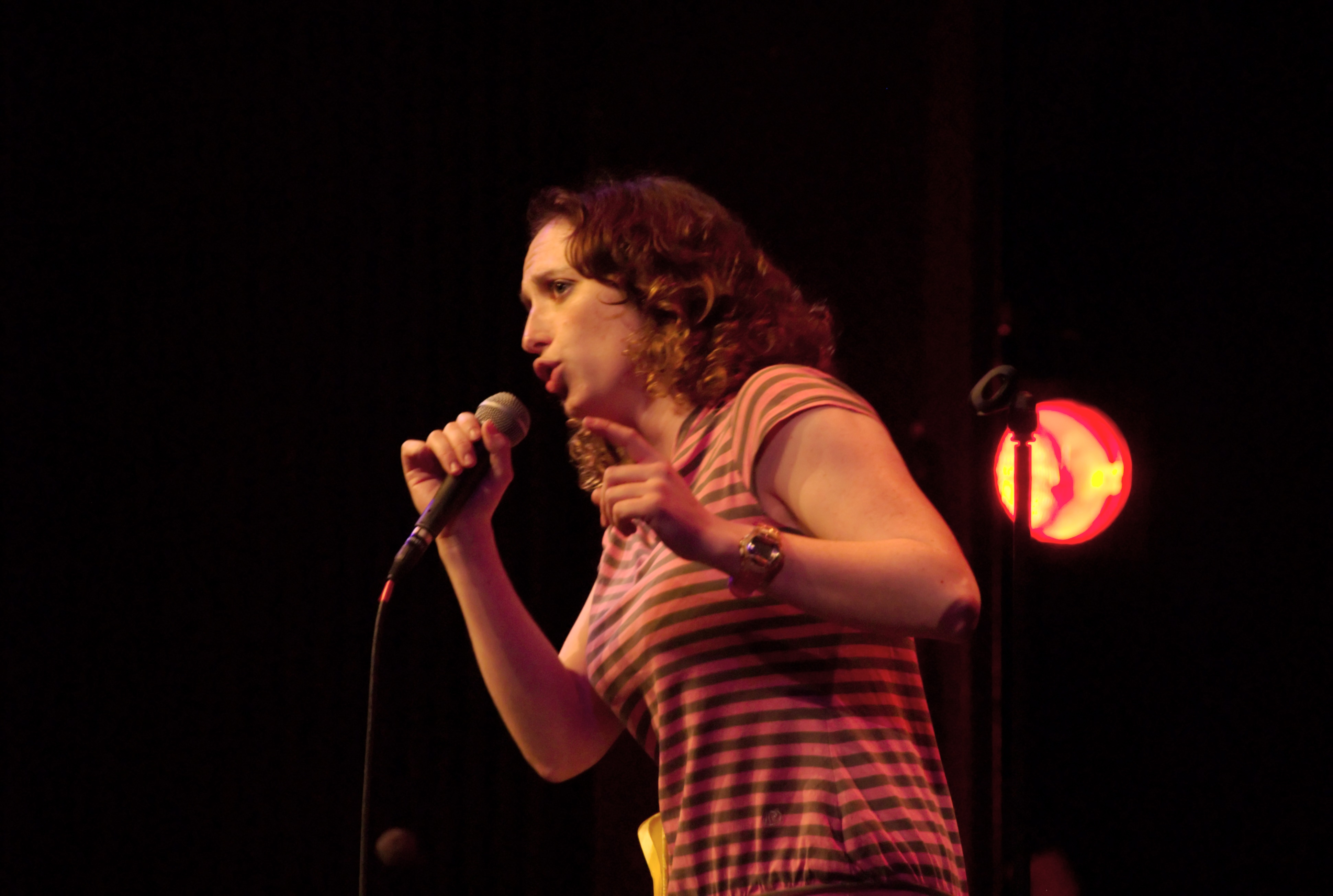 Isobel "Isy" Suttie in 2007